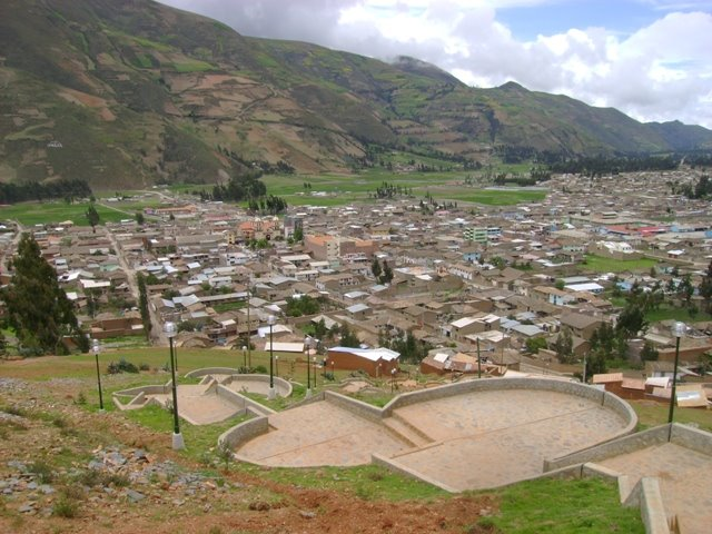 Valle_de_Pampas